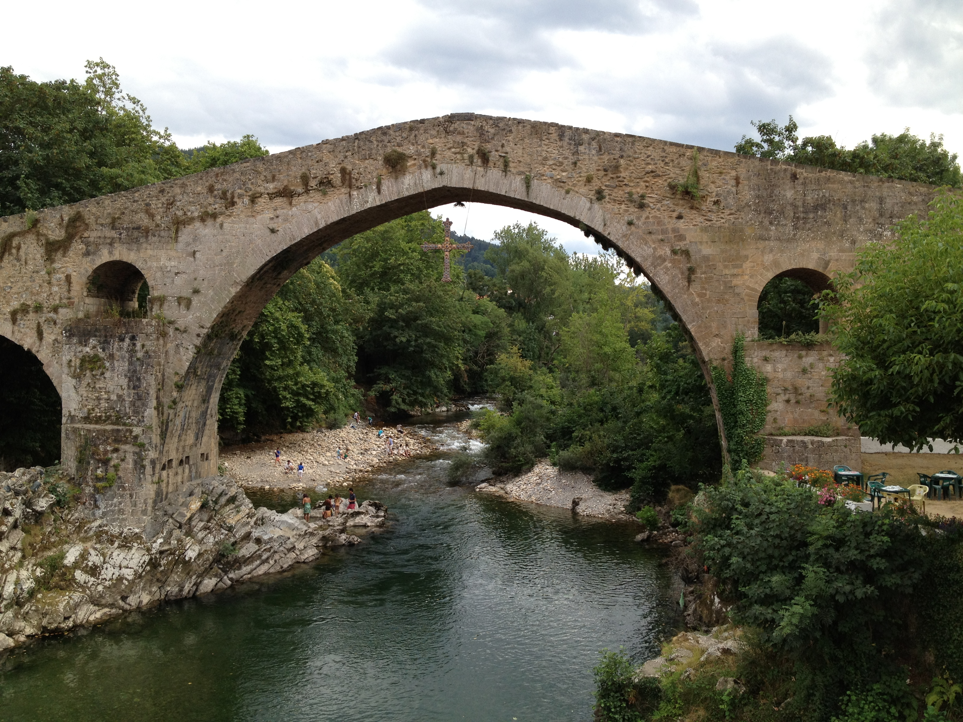 Puente sobre el Sella en Cangas de Onís